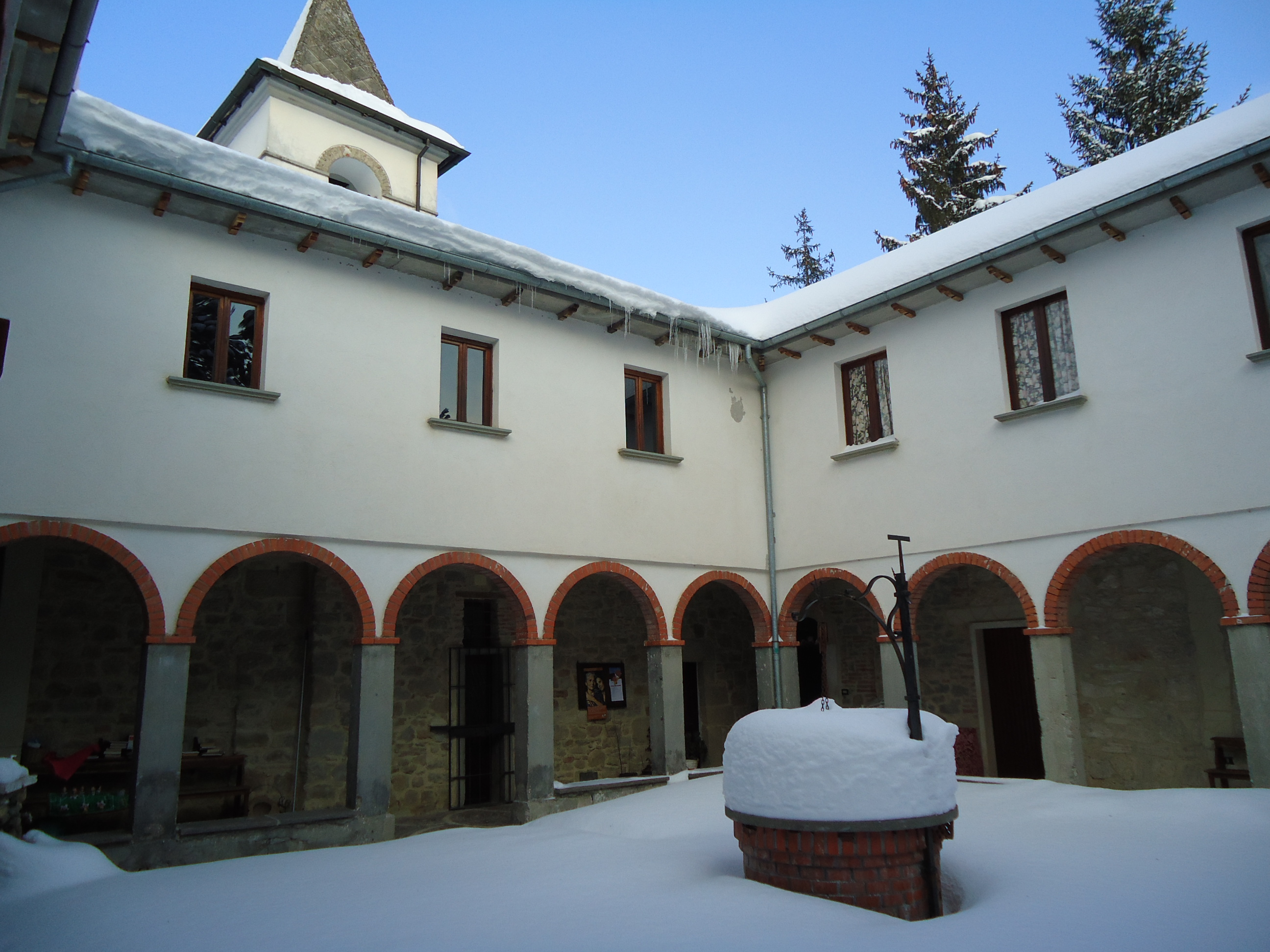 Cortile del romitorio del Santuario della Madonna delle Grazie - Varoni (Amatrice)